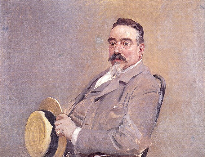 Retrato de Antonio García Peris realizado por Joaquín Sorolla y Bastida. Óleo / lienzo, 74x98,5 cm.